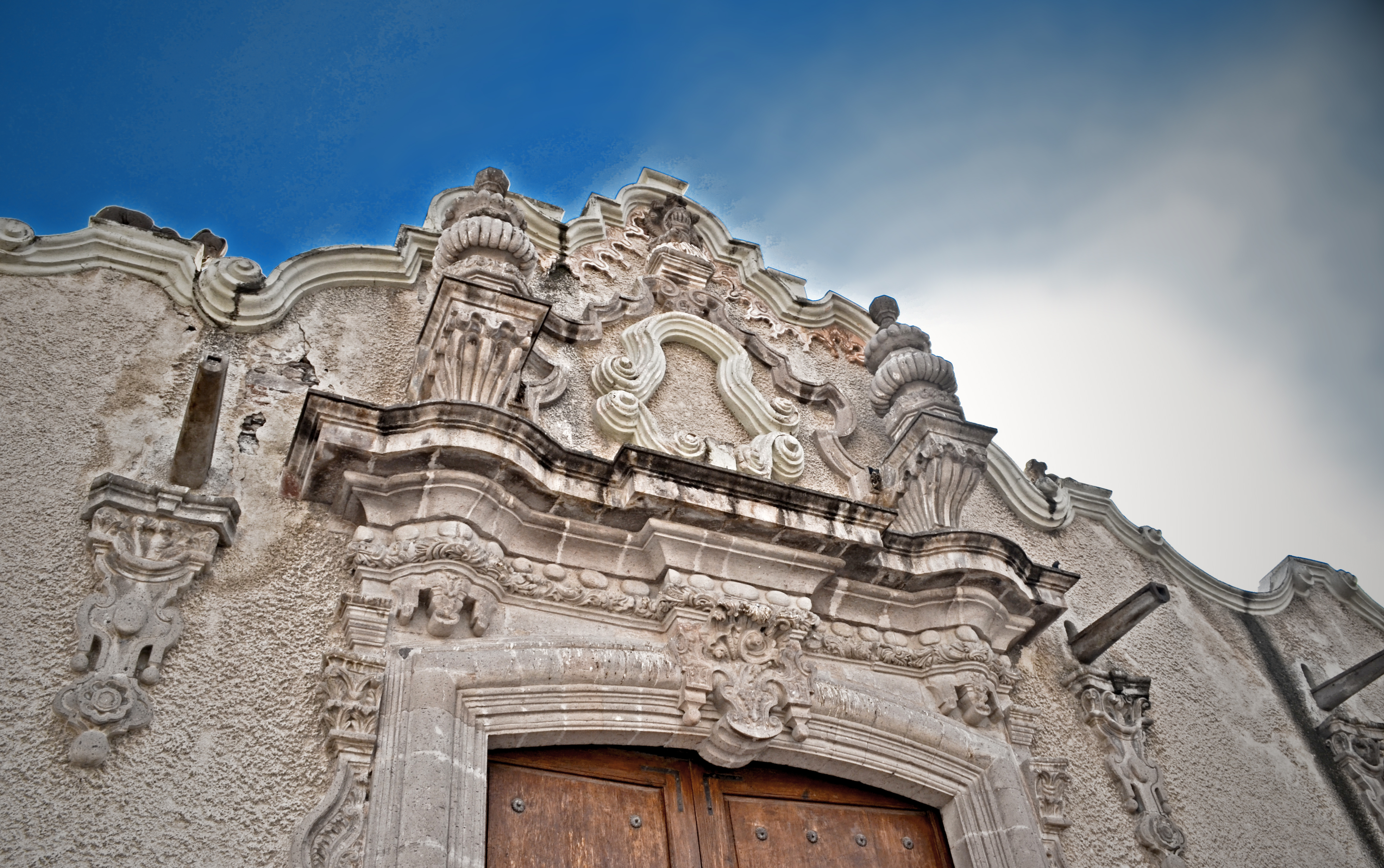 Palacio de Herrera